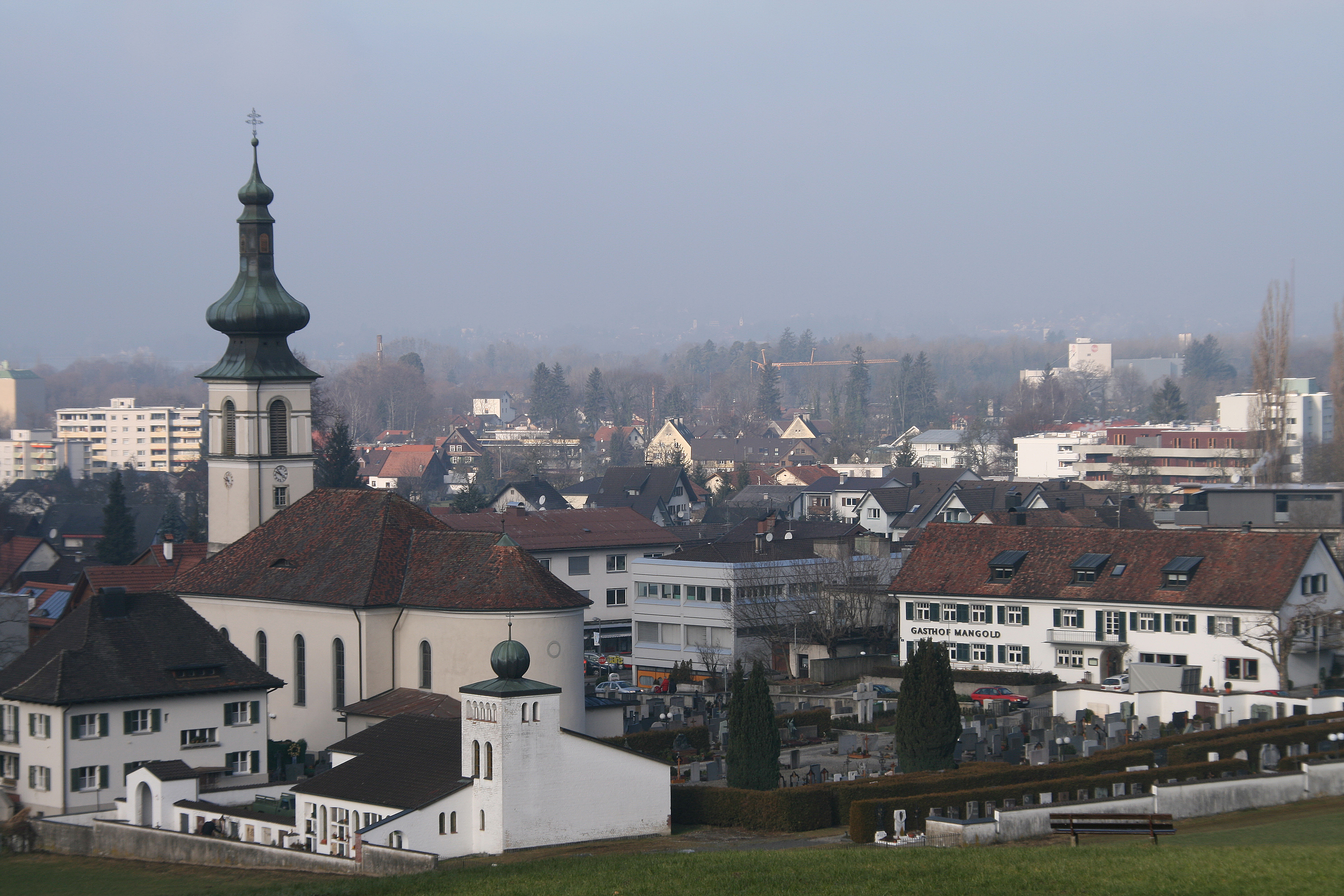 Pfarrkirche zum Hl. Xaver” rechts der Gasthof Mabgold in Lochau, Vorarlberg.